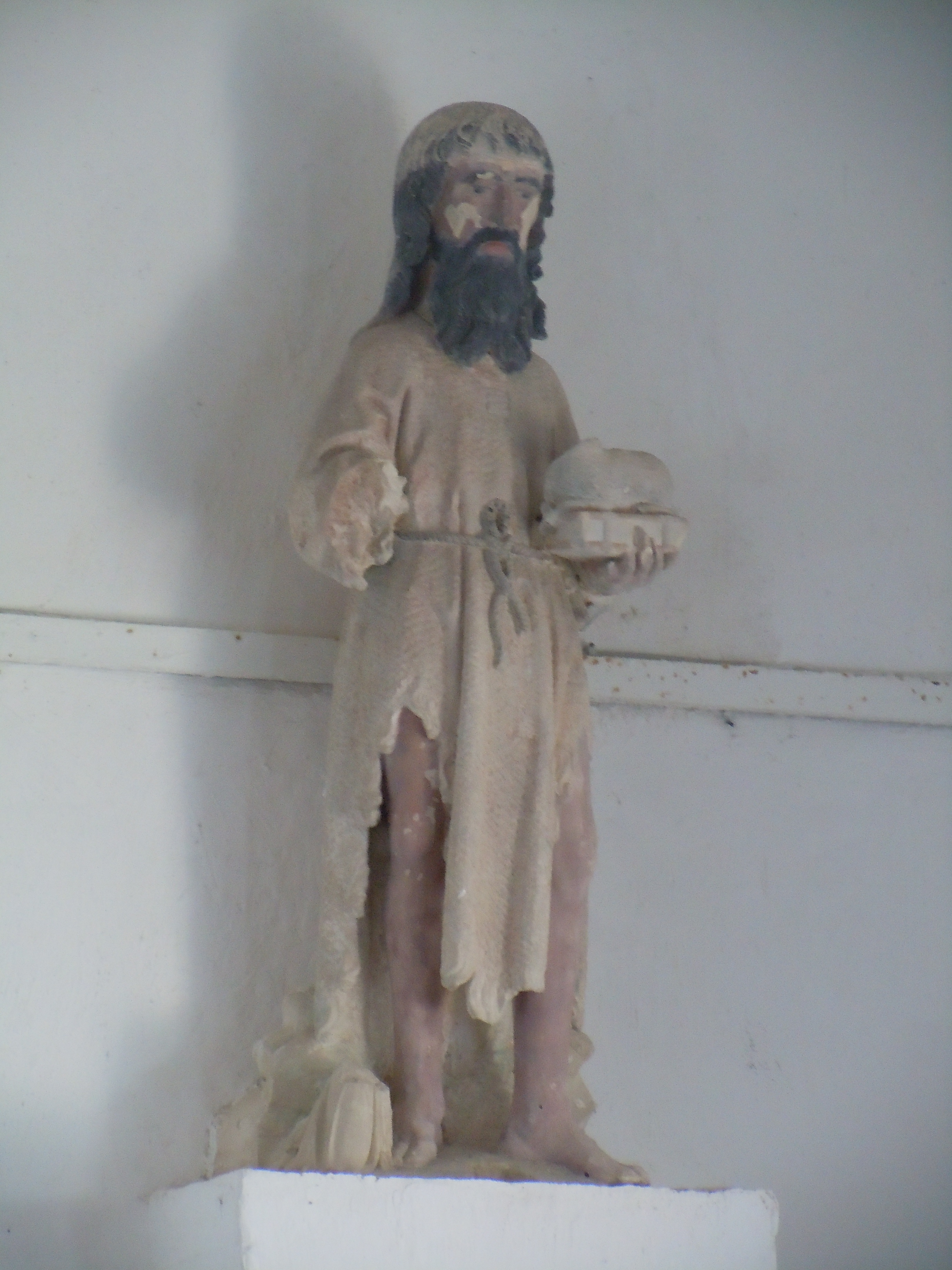 Clermont en Auge- Staue de Saint Jean-Baptiste - Calvados - France - 15e siècle